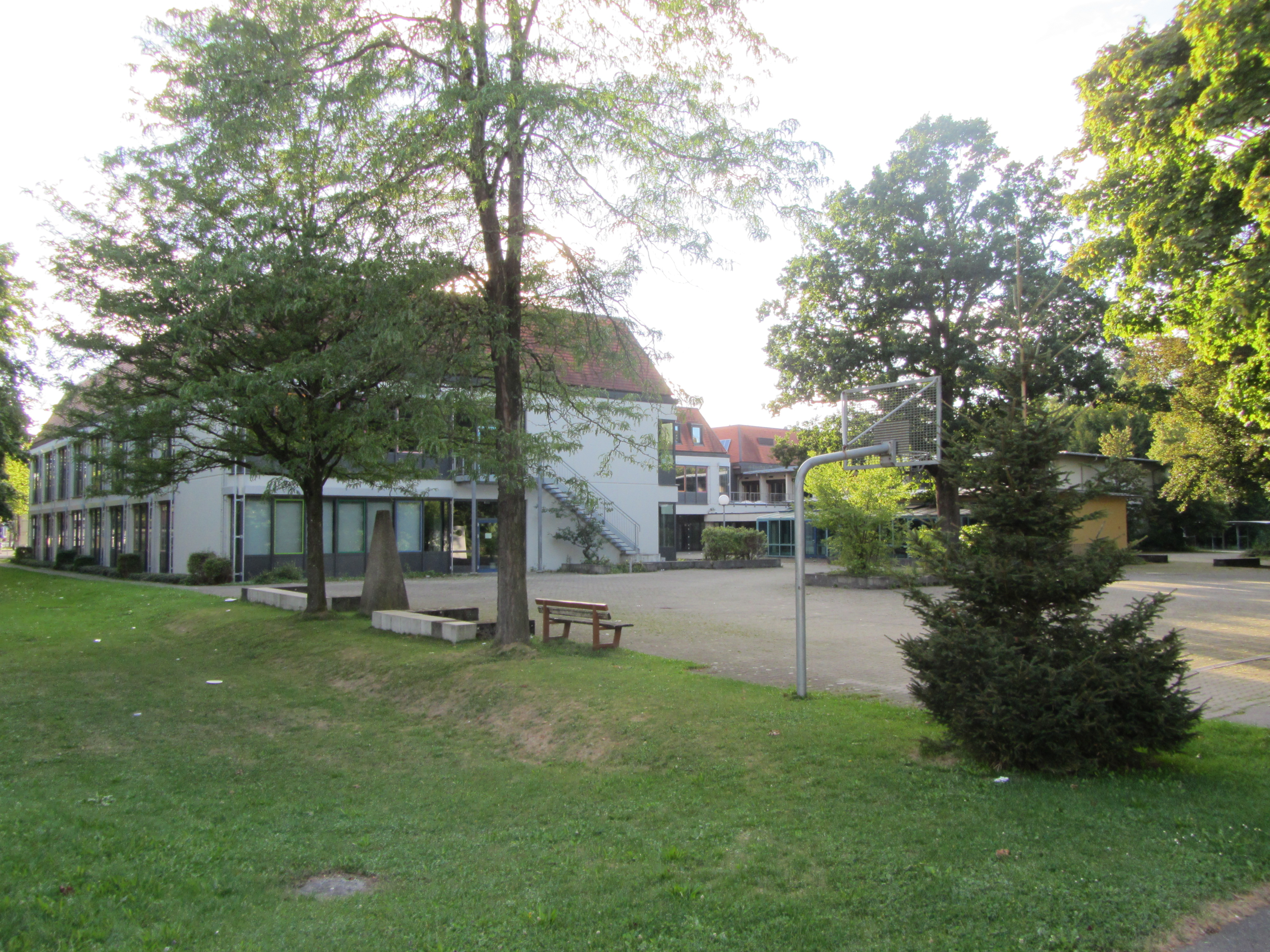 Salvatorkolleg (Bad Wurzach) - Neubau